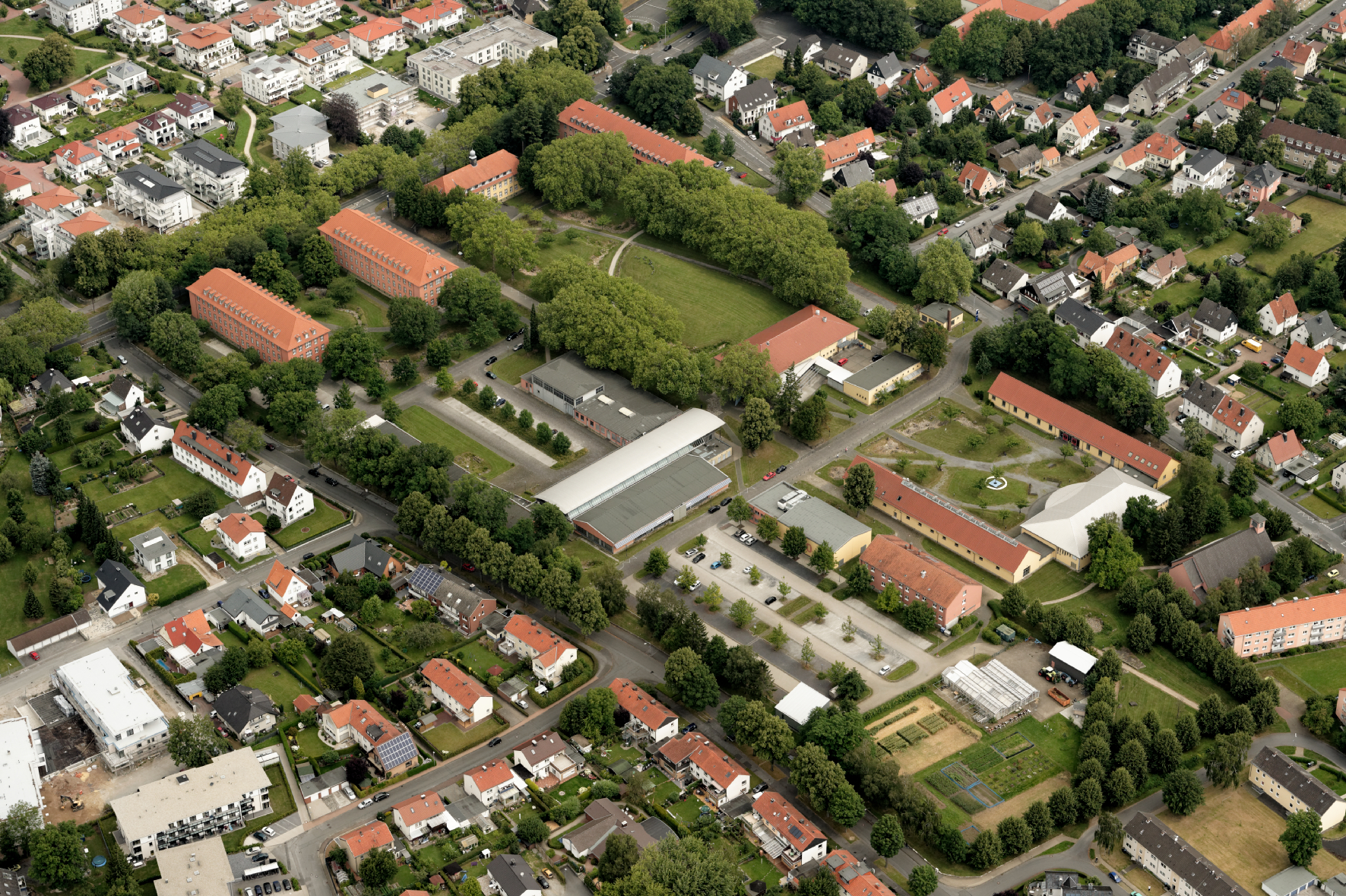 Fotoflug Sauerland Nord. Soest: Fachhochschule Südwestfalen, Standort Soest, Windmühlenweg The making of this document was supported by the Community-Budget of Wikimedia Germany.